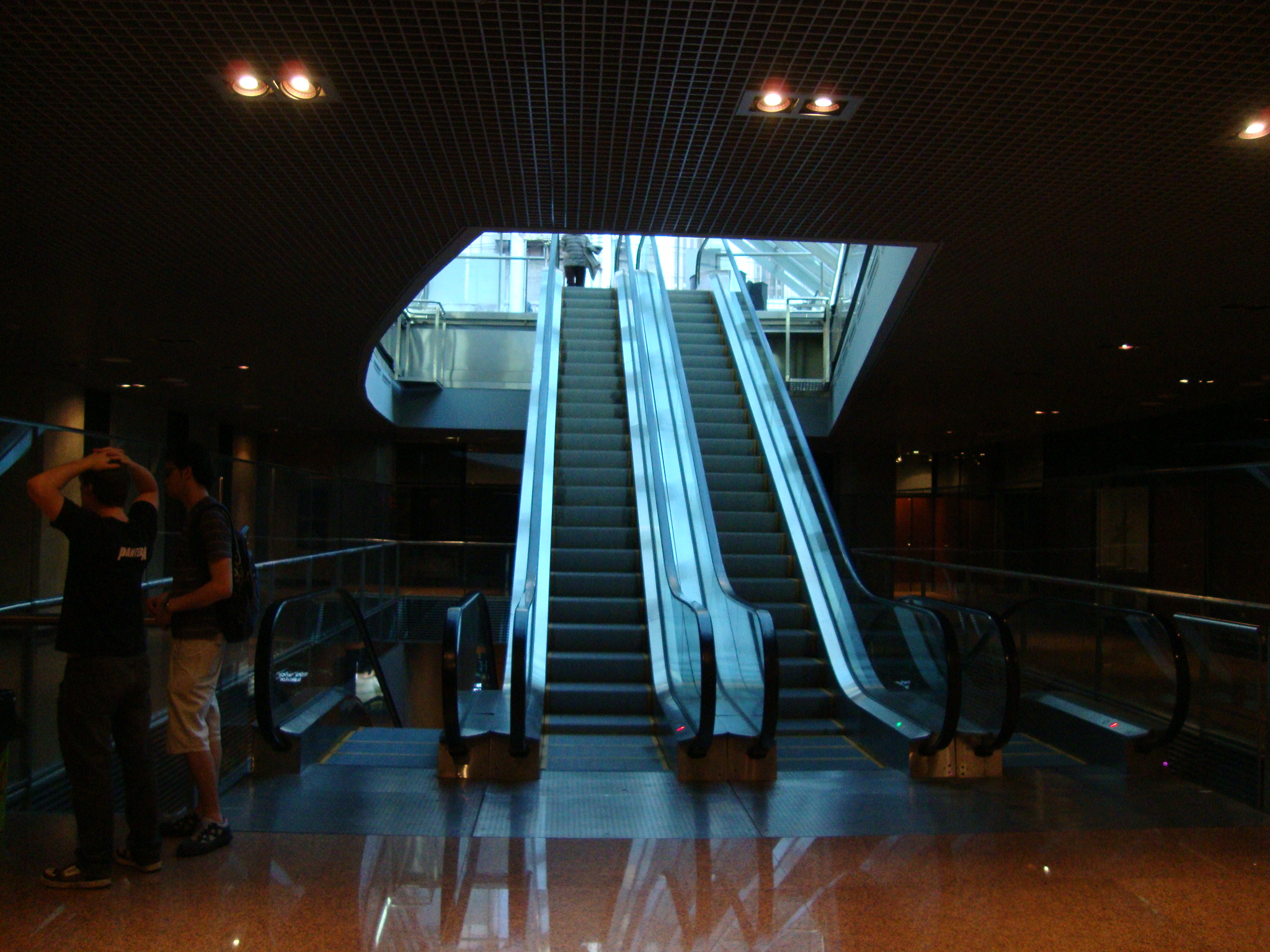 Hall de la expansión Bajo Plaza del Centro Cultural San Martín en Buenos Aires. Primer subsuelo.